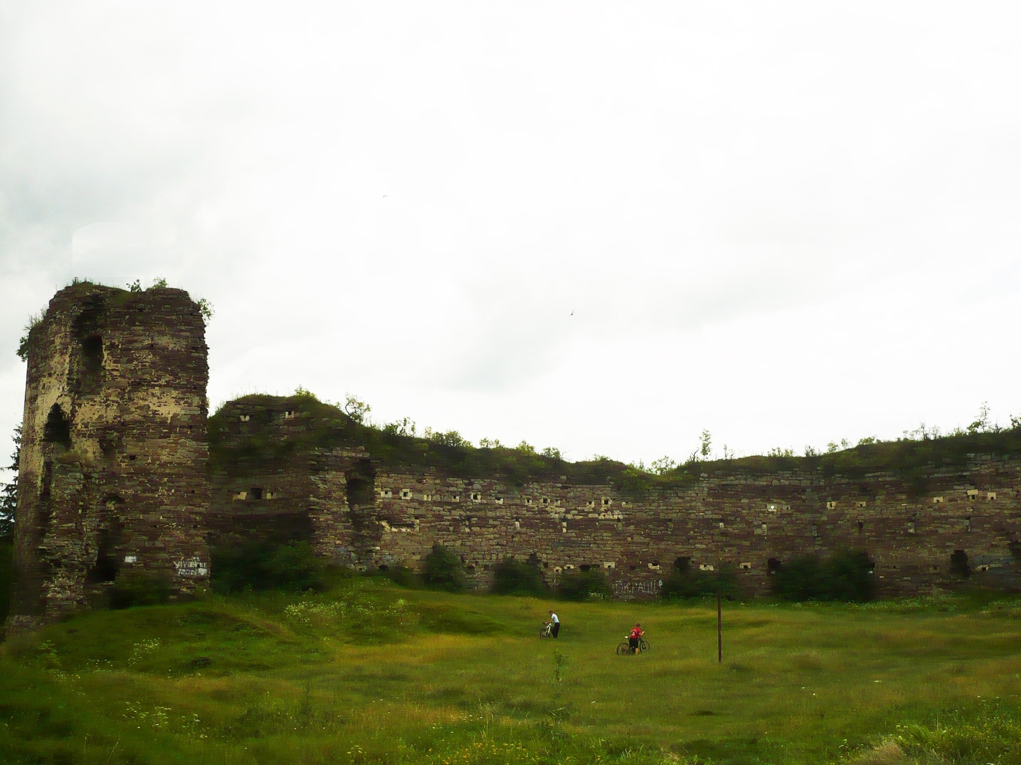 Buczacz. Zamek